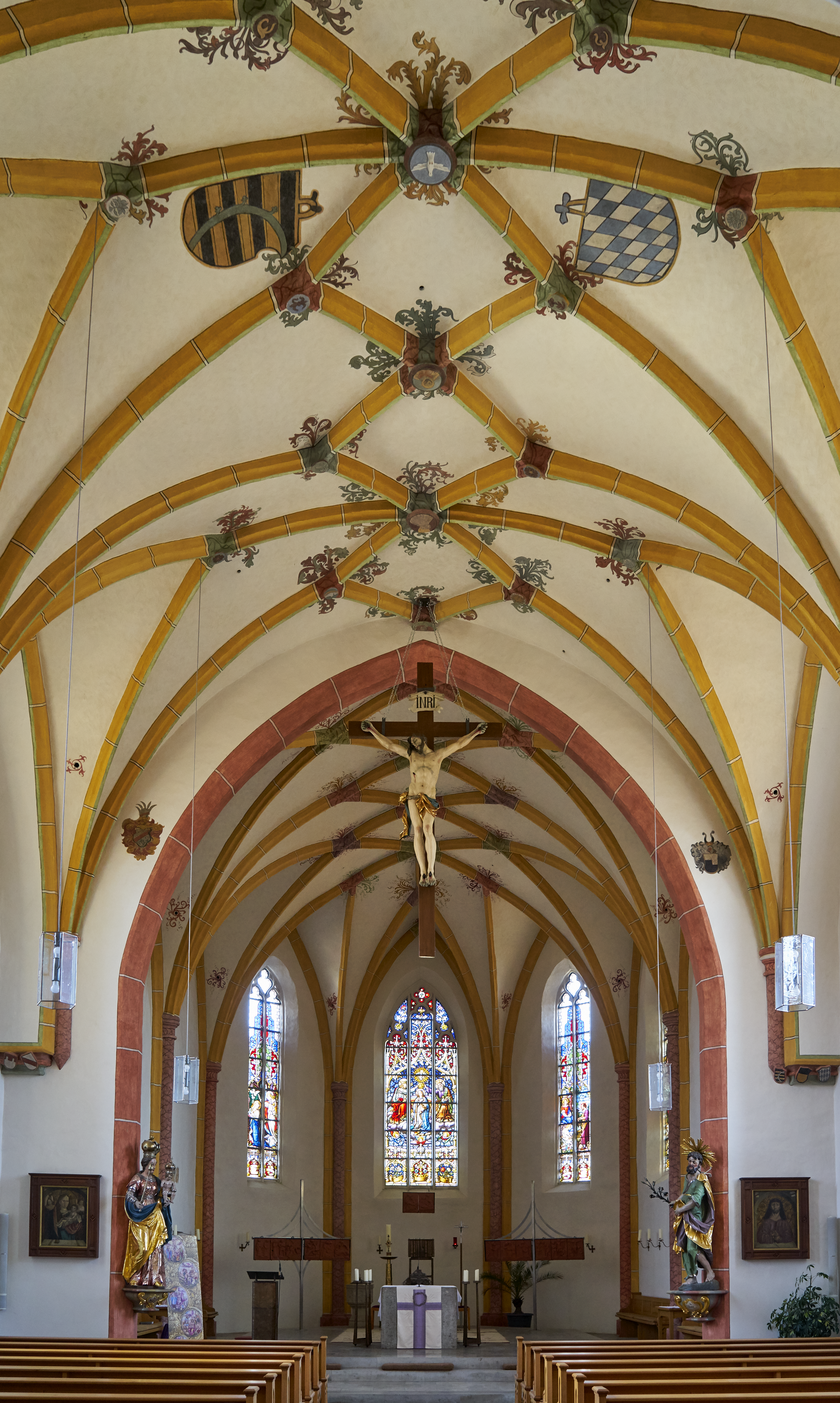 Kath. Pfarrkirche Mariä Himmelfahrt, Saalkirche mit Polygonalchor, Chorflankenturm, zweigeschossiger Sakristei und offener Vorhalle, spätgotisch, spätes 15. Jh. (bez. 1461), am Langhaus Hochwassermarke des Passauer Typs von 1501; mit Ausstattung; Friedhofsmauer aus Tuffstein, wohl 16./17. Jh.